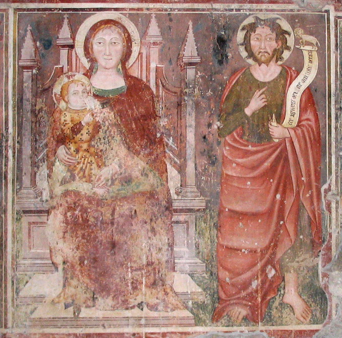 Madonna in trono e San Giovanni Battista, affresco attribuito al cosiddetto "Maestro del 1388" e datato alla fine degli anni '80 del XIV secolo. Chiesa di San Giorgio in Lemine (ad Almenno San Salvatore, Bergamo). Fotografia di Giorces.